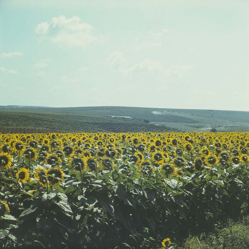 Anenii Noi district - 2 (1980).